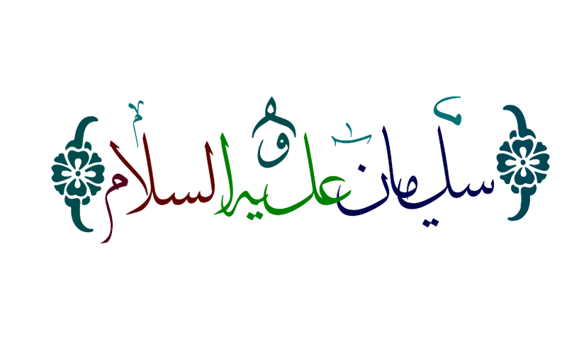 سلیمان علیہ السلام